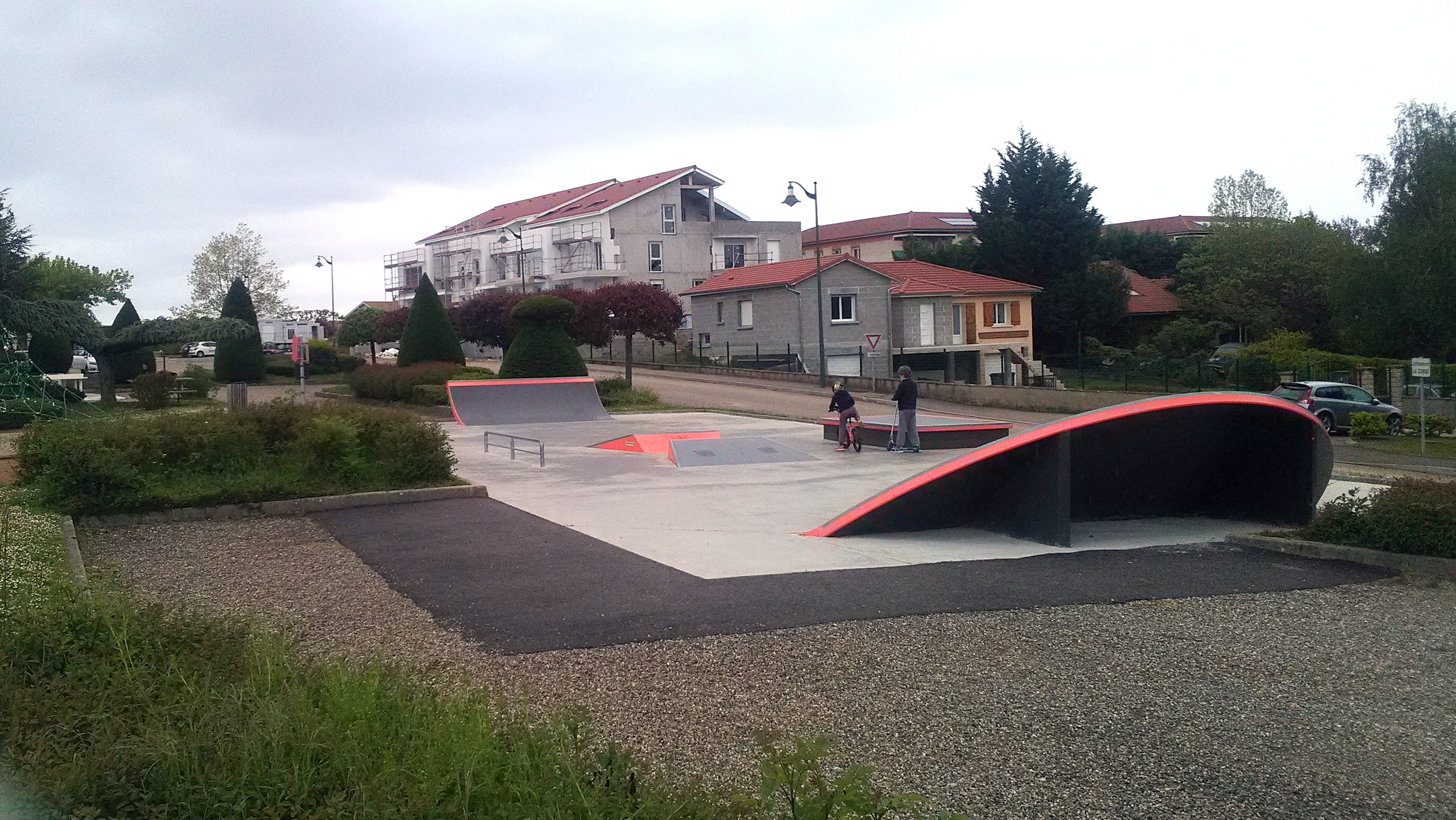 Espace de jeux enfants